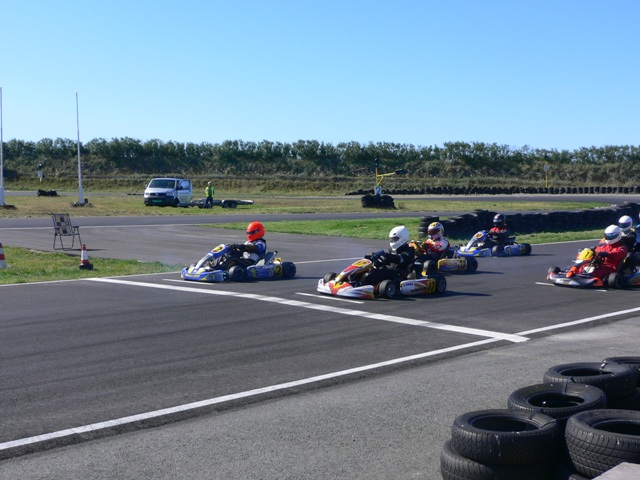 Karting